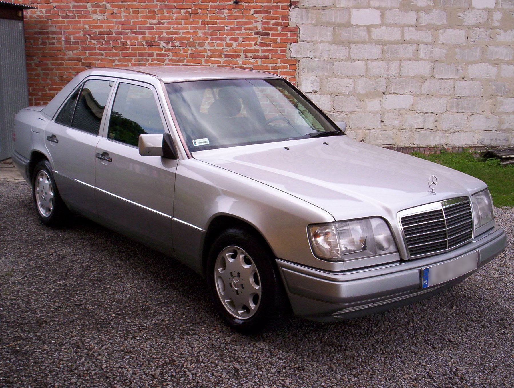 Mercedes-Benz W124 E280 (sedan)